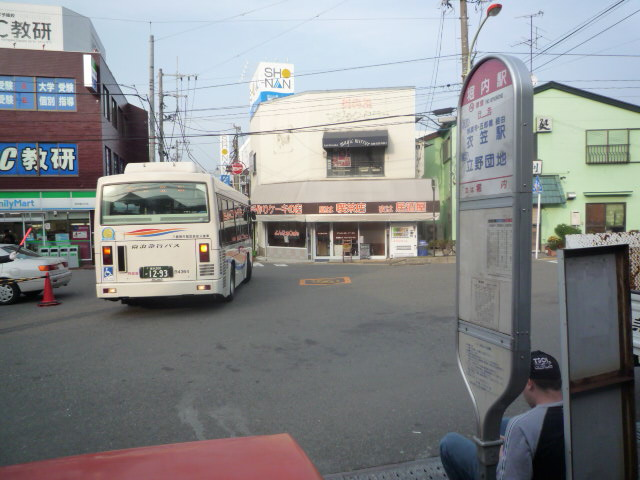 駅前広場を撮影